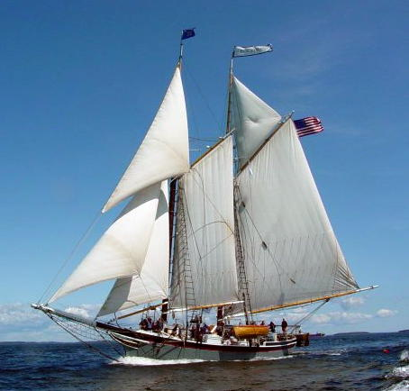 La goélette américaine Lewis R. French sous voile